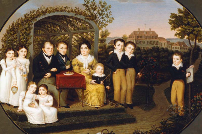 Der Bankier Jacob Friedrich Schmid (1777-1824) und seine Familie vor seinem Landsitz in Augsburg-Kriegshaber, Rambergstraße 19 (Franzosenhof)